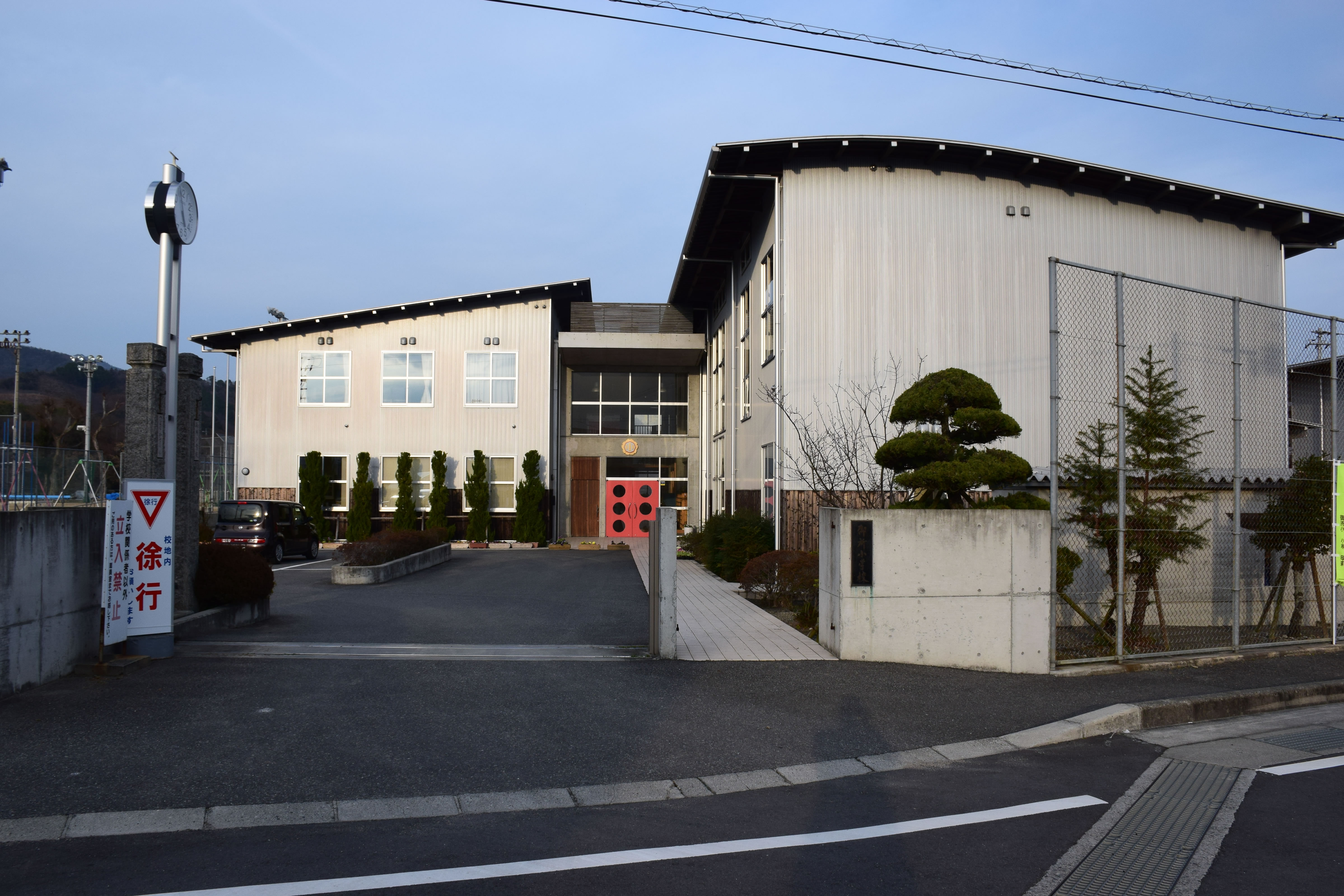 阿波市立御所小学校